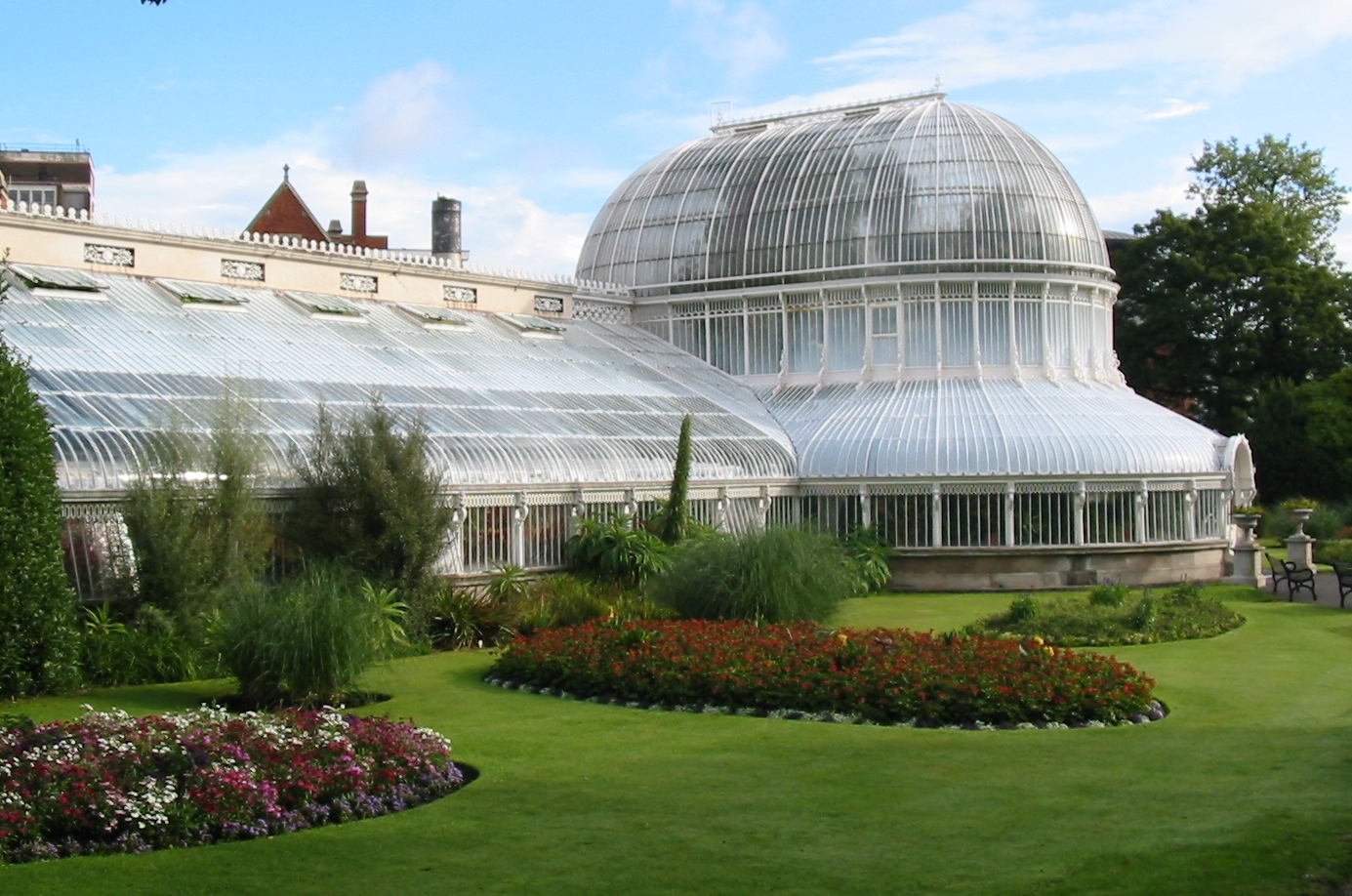 Palm House, Botanic Gardens, Belfast